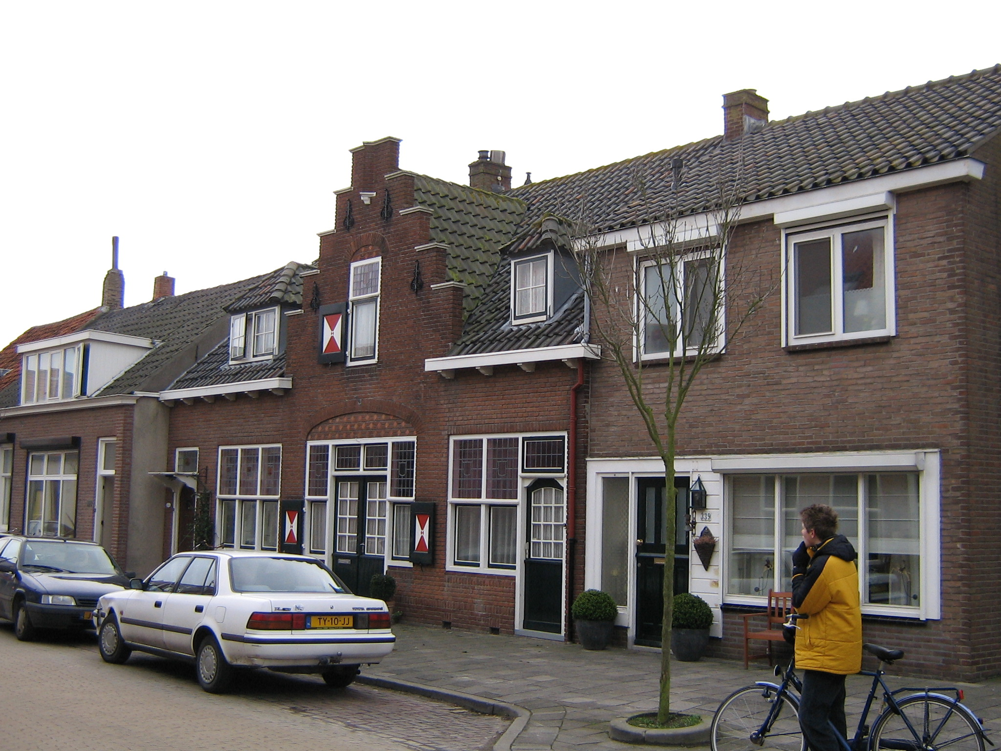 Perdamme/Brigdamme, neo-renaissancegevel.